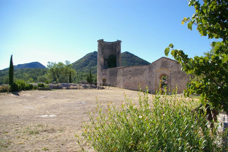 Château de Pontevès mit Bessillon im Hintergrund.